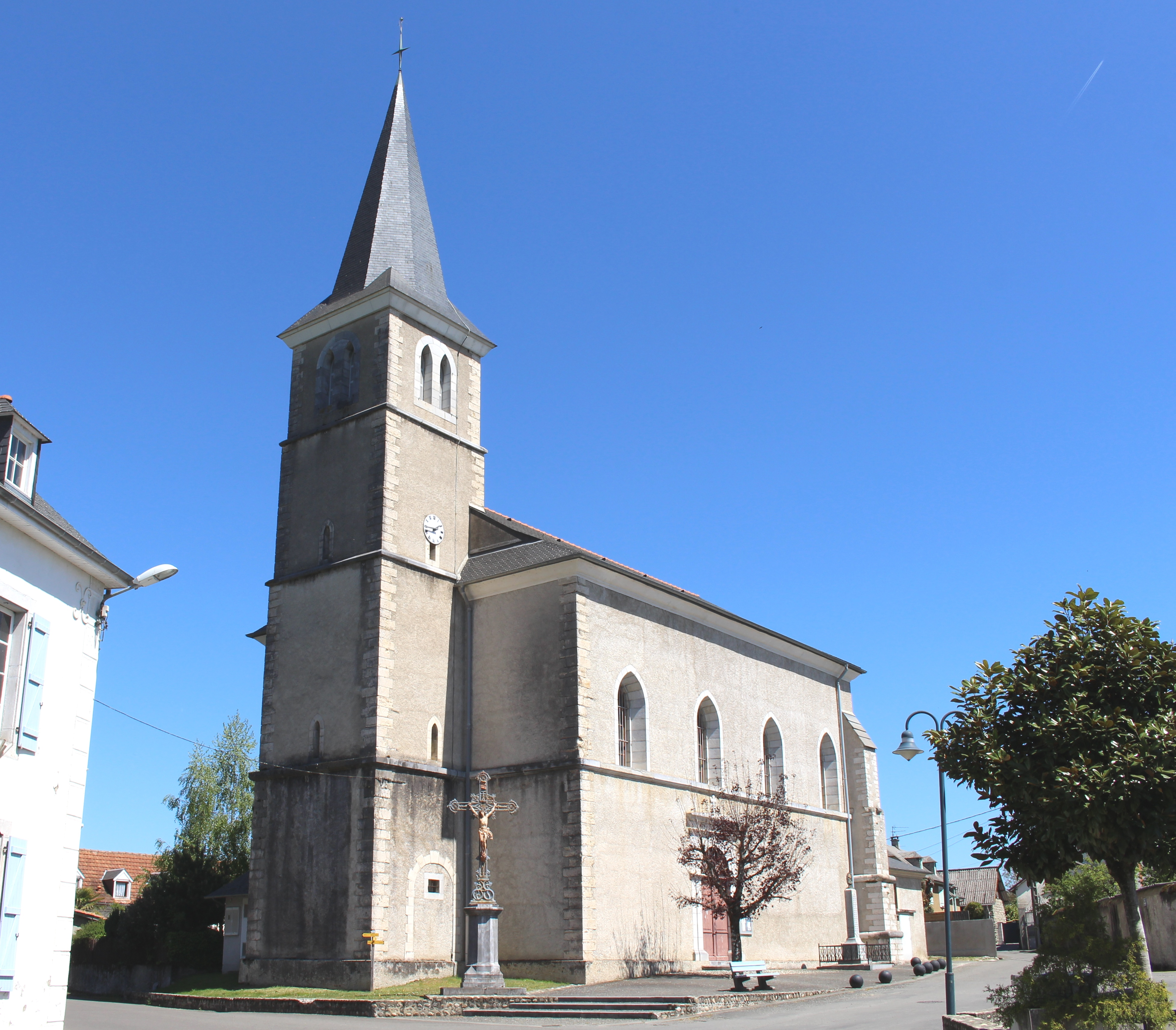 Église Saint-Misselin d'Arcizac-Adour (Hautes-Pyrénées)